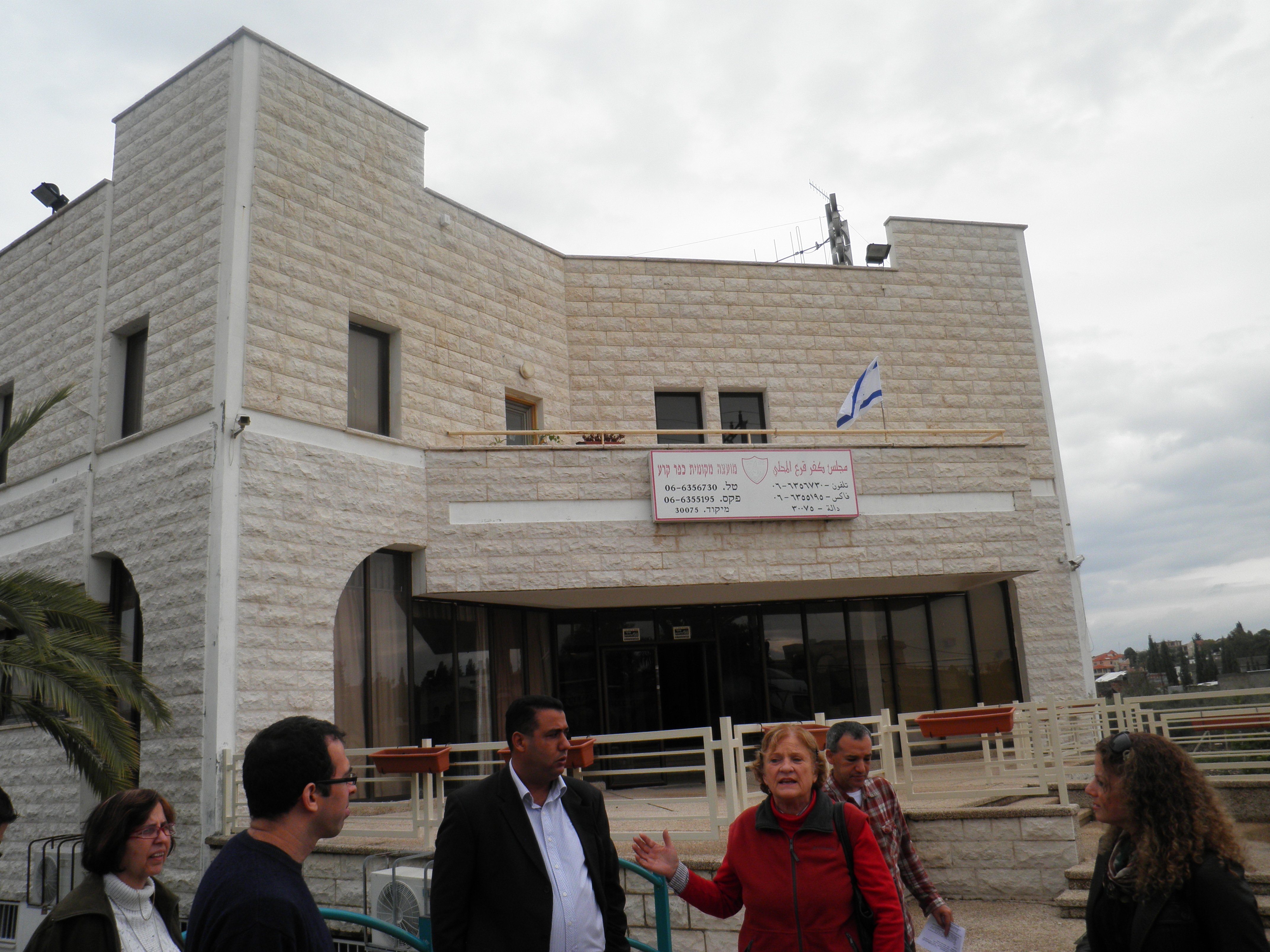 כפר קרע